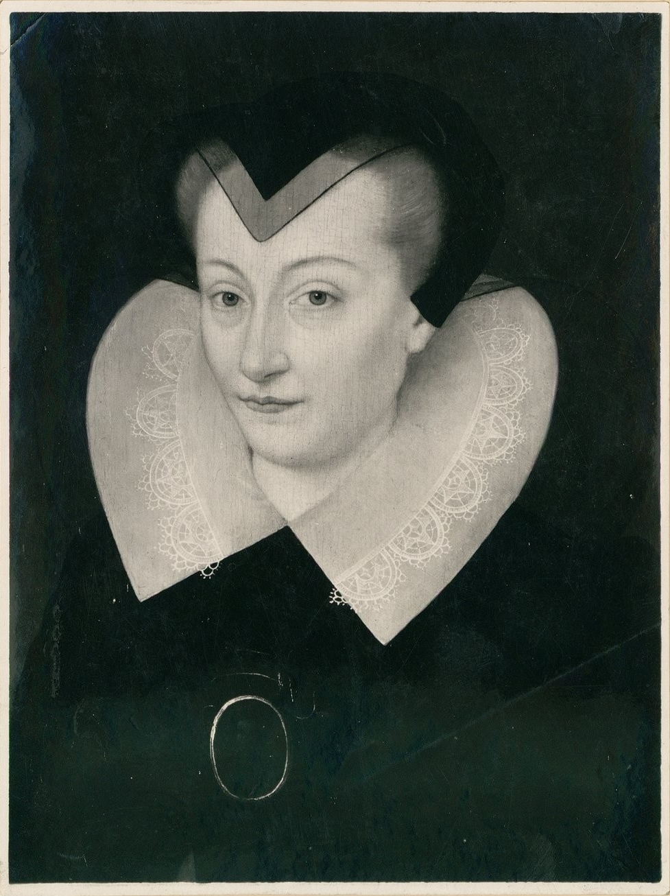 Portraits de Françoise Robertet d'Aumont (XVIe s.)